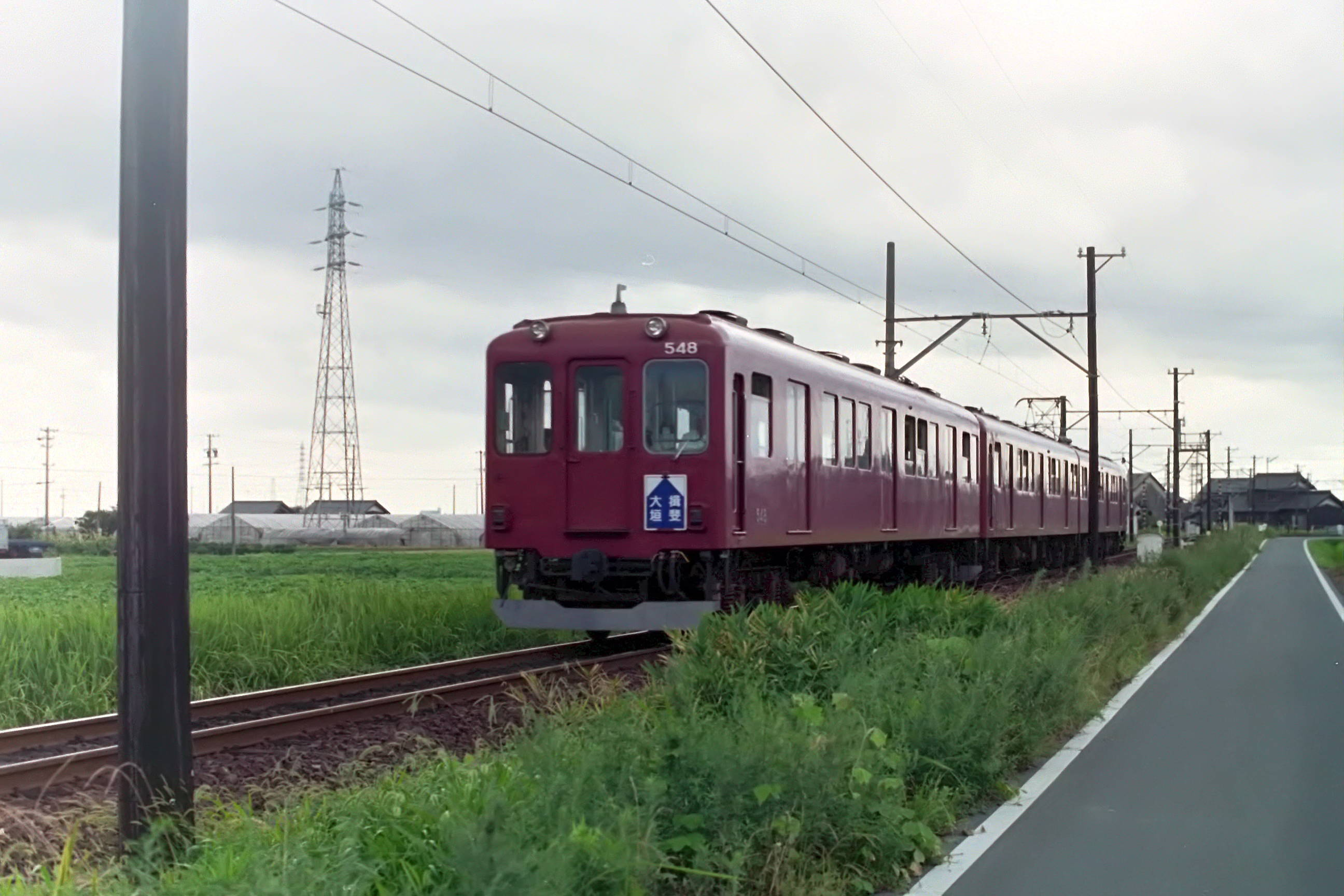 近鉄 ク548 美濃本郷駅-揖斐駅間